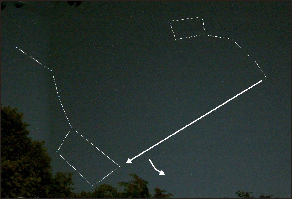 Weitwinkelaufnahme des nördlichen Nachthimmels mit den Sternbildern Kleiner und Großer Wagen; Aufnahmezeit: 4. Juli 2004, 0:40 Uhr MESZ; Aufnahmeort: Deutschland. Die Bäume am unteren Bildrand geben einen Hinweis auf die Lage des Horizonts.